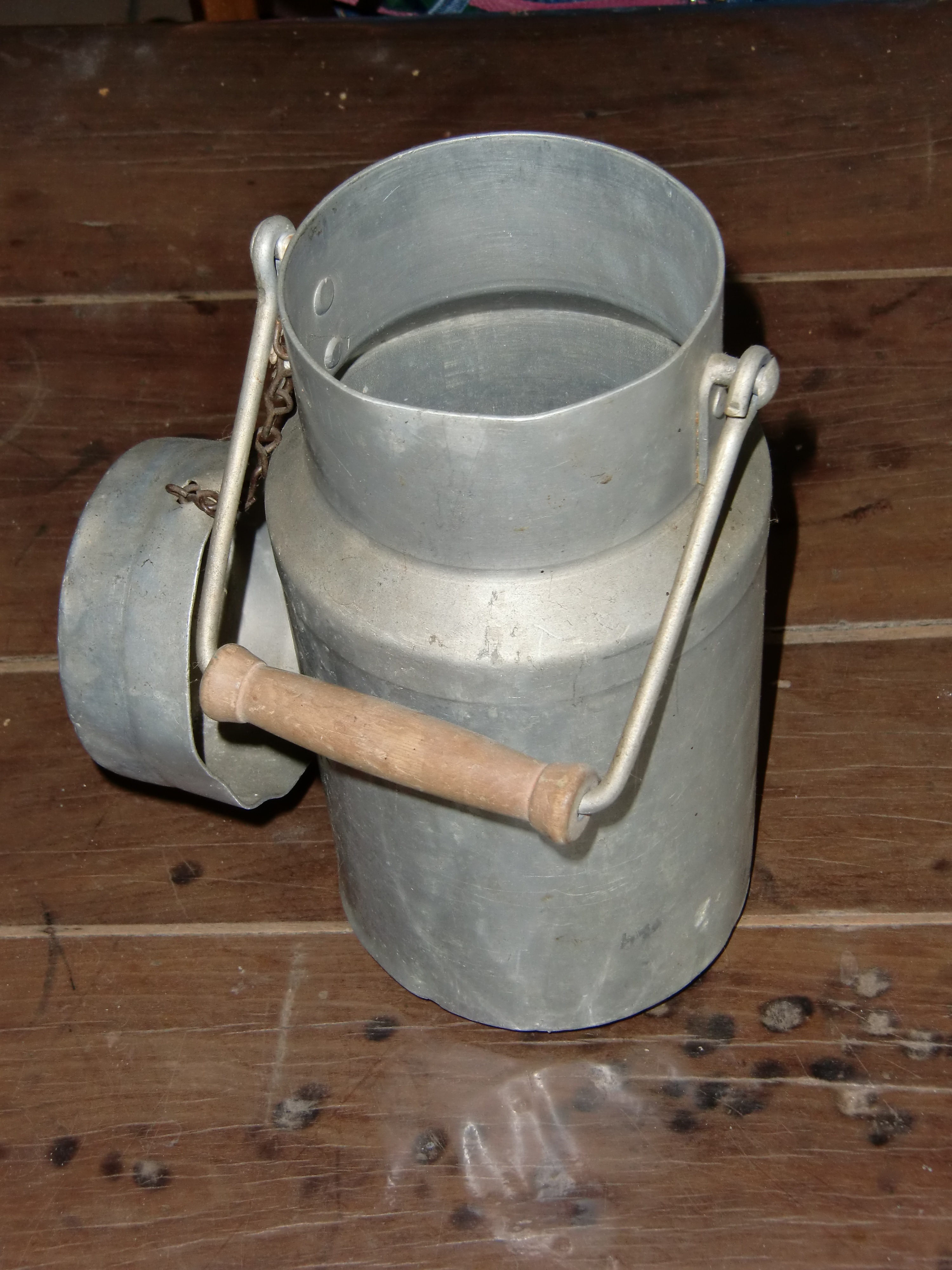 Boîte à lait utilisée en France pour aller acheter le lait au détail chez l'épicier jusque dans les années 1980